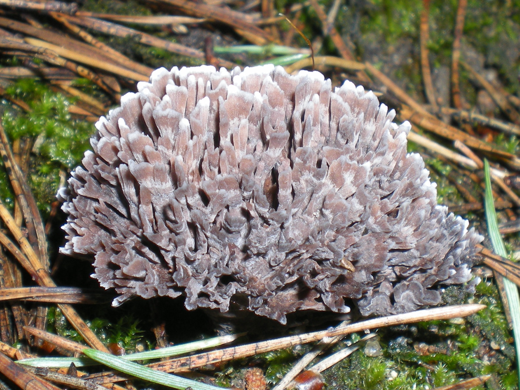 Stinkende Lederkoralle, Stinkender Warzenpilz (Thelephora palmata) in Polen